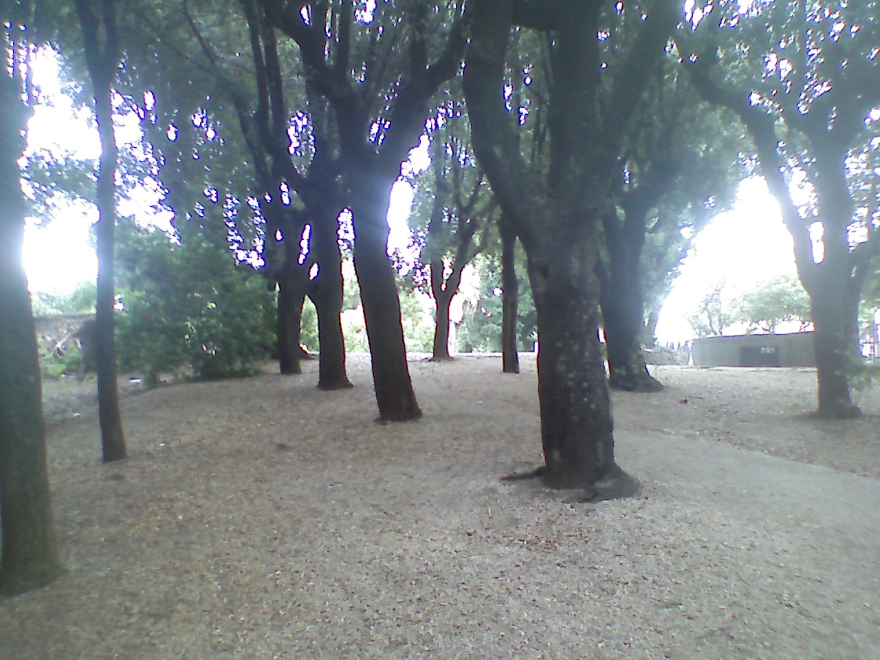 Viale di Villa Desideri